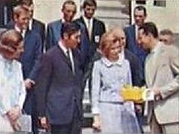 Le roi Baudoin et son épouse accueillent Eddy Merckx, son épouse, ainsi que son équipe, après leur première victoire au tour de France 1969 ('Sprint 74' p.32, Panini figurina).